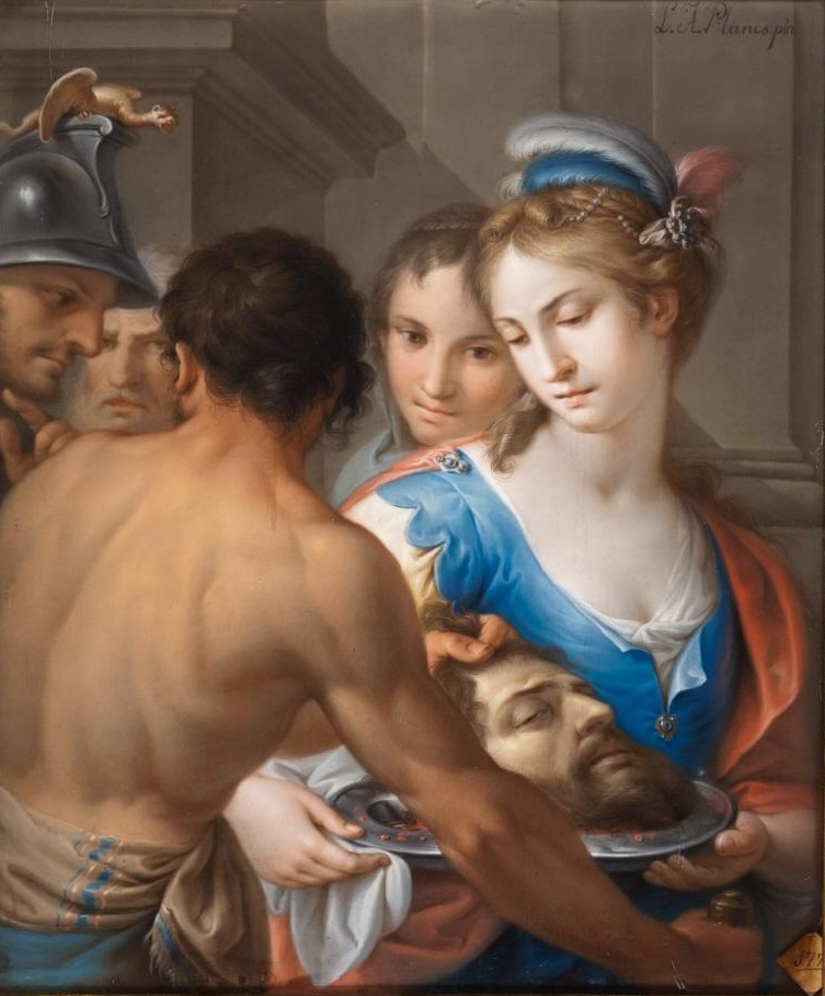 La obra representa a la princesa judía Salomé llevando en sus manos una bandeja en la que está depositada la cabeza cercenada del profeta San Juan Bautista.